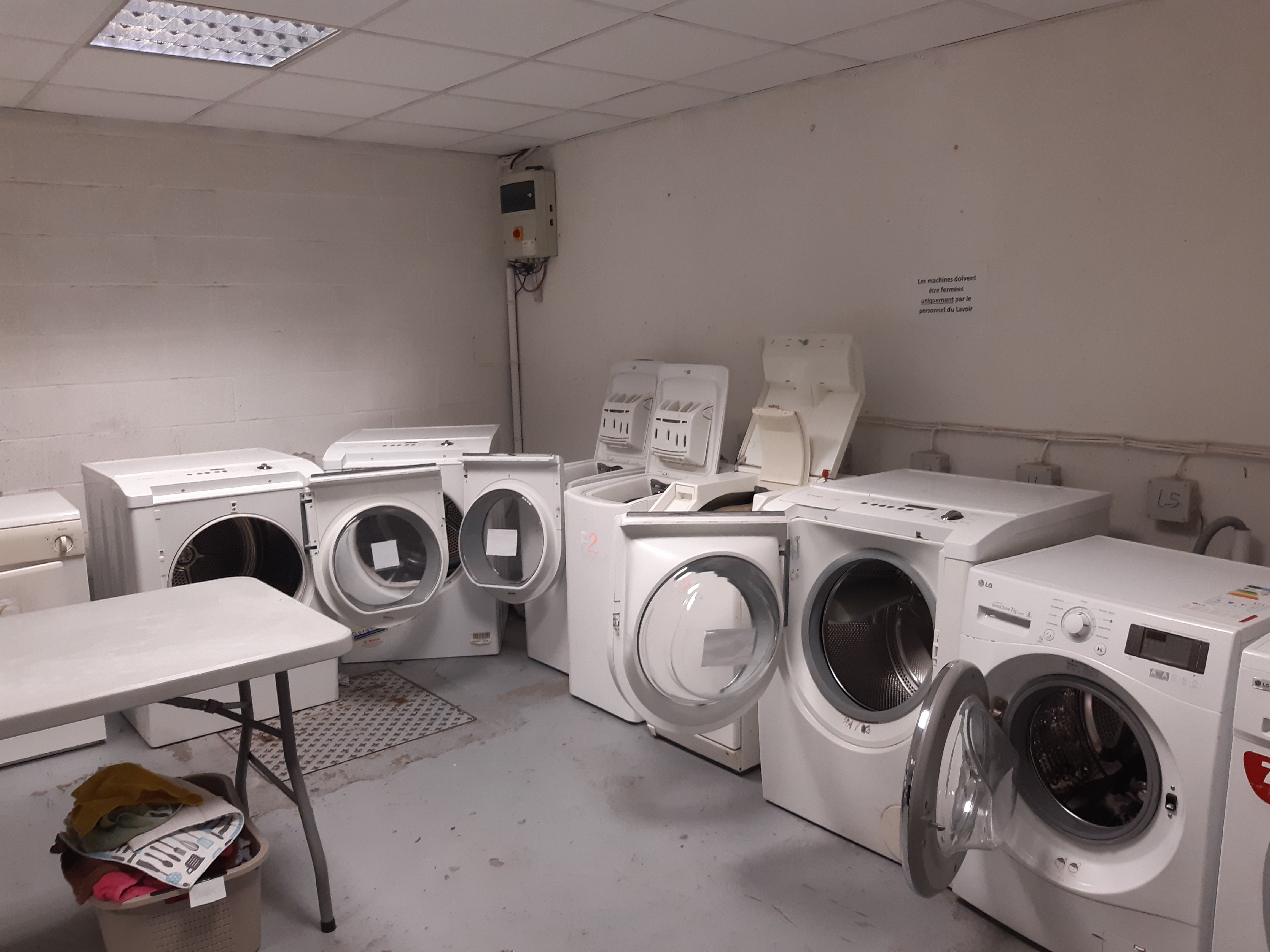 Faubourg de Bethune. Les machine s de la laverie solidaire